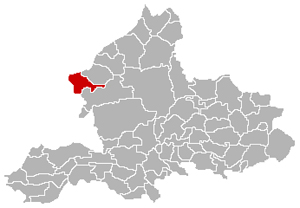 Karte Nijkerk in Gelderland von :nl:Gebruiker:Mtcv